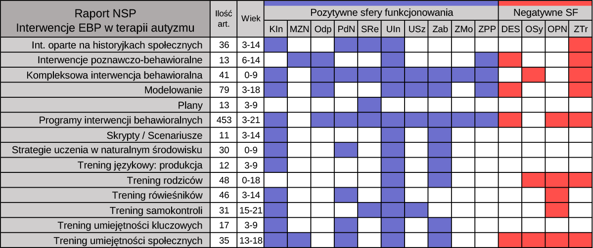 KIn – komunikacja interpersonalna MZN – możliwości zmniejszenia nadzoru (np. w placówce edukacyjnej, w domu) Odp – odpowiedzialność za siebie (umiejętności życiowe) PdN – przygotowanie do nauki (słuchanie poleceń, możliwość siedzenia w skupieniu) SRe – samoregulacja (zarządzanie swoim zachowaniem, by osiągnąć wyznaczony cel) UIn – umiejętności interpersonalne USz – umiejętności szkolne Zab – zabawa (samodzielna; w typowy, prawidłowy sposób) ZMo – zdolności motoryczne ZPP – złożone procesy poznawcze (np. rozwiązywanie problemów, myślenie krytyczne, zadania związane z teorią umysłu). DES – dysregulacja emocjonalna i sensoryczna (np. ignorowanie bodźców, zaburzenia snu, lęk, depresja) OSy – ogólne symptomy (autystyczne lub braki psychoedukacyjne z nich wynikające) OPN – ograniczone, powtarzalne, niefunkcjonalne wzorce zachowań, zainteresowań i aktywności ZTr – zachowania trudne (np. agresja, samouszkodzenia, niewłaściwie zachowania seksualne) Interwencje oparte na historyjkach społecznych (ang. story-based intervention) Interwencje poznawczo-behawioralne (ang. cognitive behavioral intervention package) Kompleksowa interwencja behawioralna (ang. comprehensive behavioral treatment for young children) Modelowanie (ang. modeling) Plany (ang. schedules) Programy interwencji behawioralnych (ang. behavioral interventions) Skrypty / Scenariusze (ang. scripting) Strategie uczenia w naturalnym środowisku (ang. natural teaching strategies) Trening językowy: produkcja (ang. language training: production) Trening rodziców (ang. parent training) Trening rówieśników (ang. peer training package) Trening samokontroli (ang. self-management) Trening umiejętności kluczowych (ang. pivotal response training) Trening umiejętności społecznych (ang. social skills package)